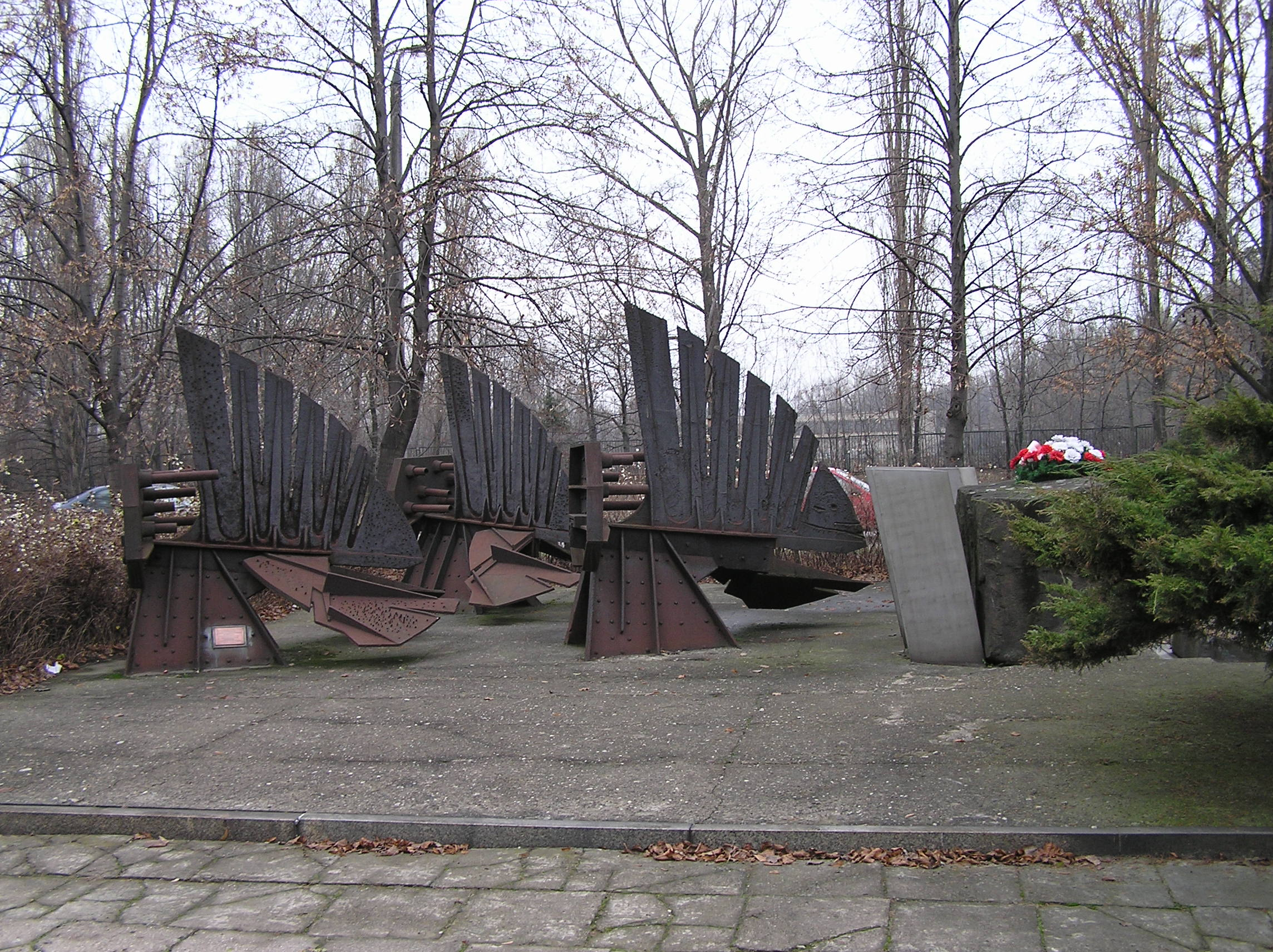 Pomnik Warszawskich Termopil, obrona Warszawy 1939 przez 30 Pułk Strzelców Kaniowskich